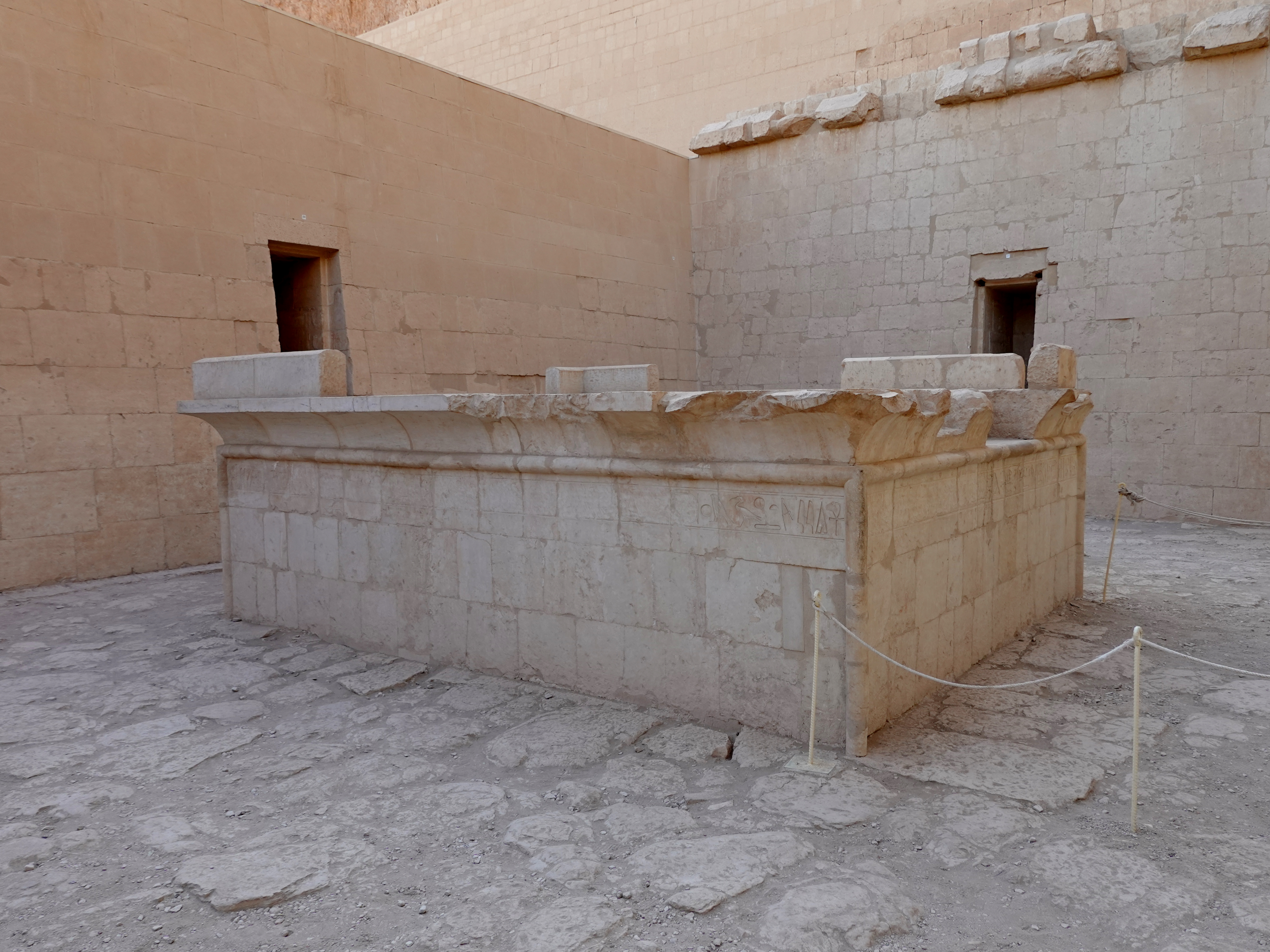 Sonnentempel im Totentempel der Hatschepsut in Deir el-Bahari nordwestlich von Luxor, Ägypten